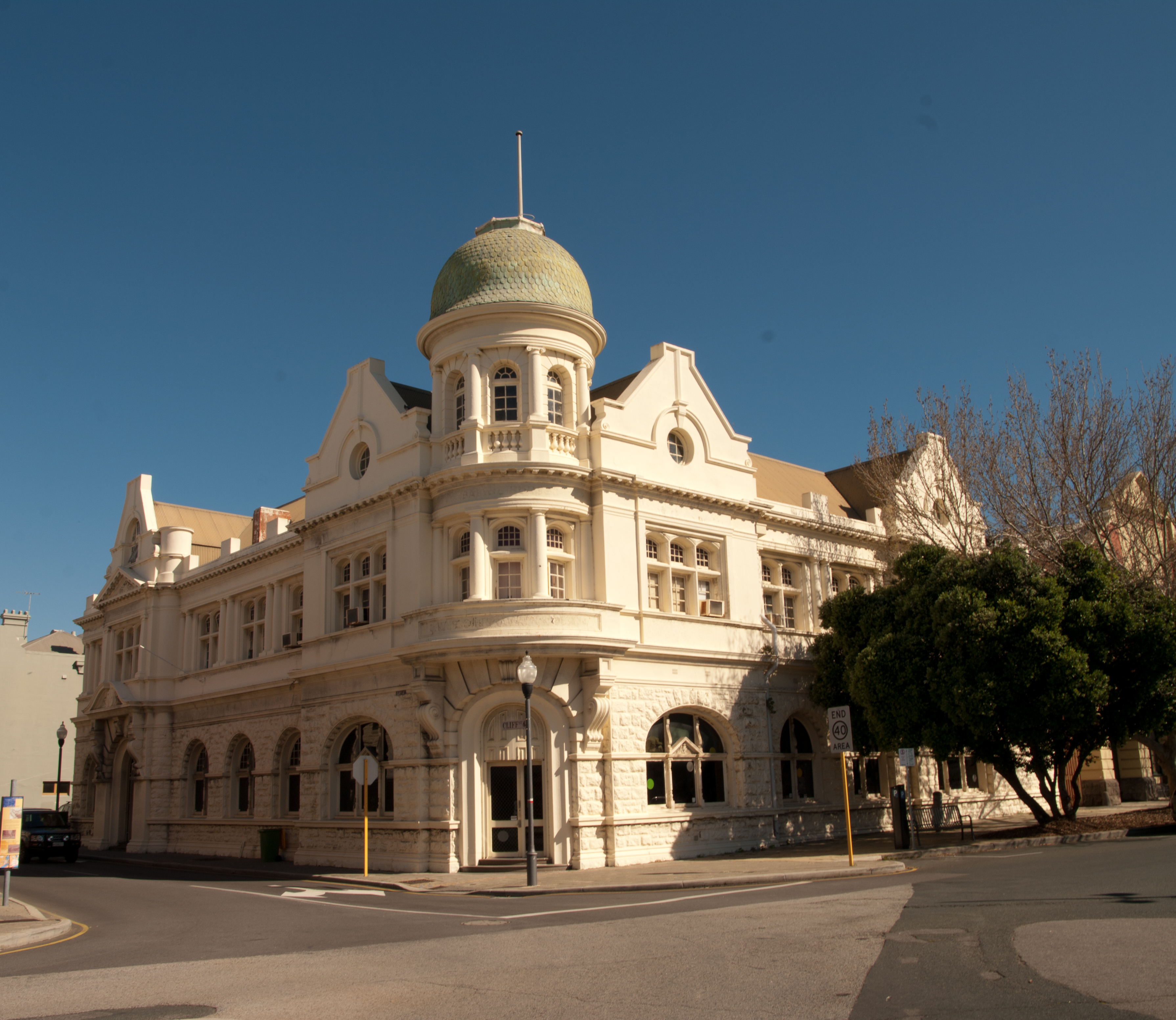 Wilhelmsen House